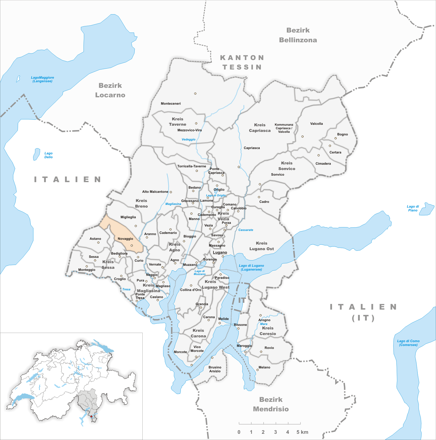 Municipality Novaggio